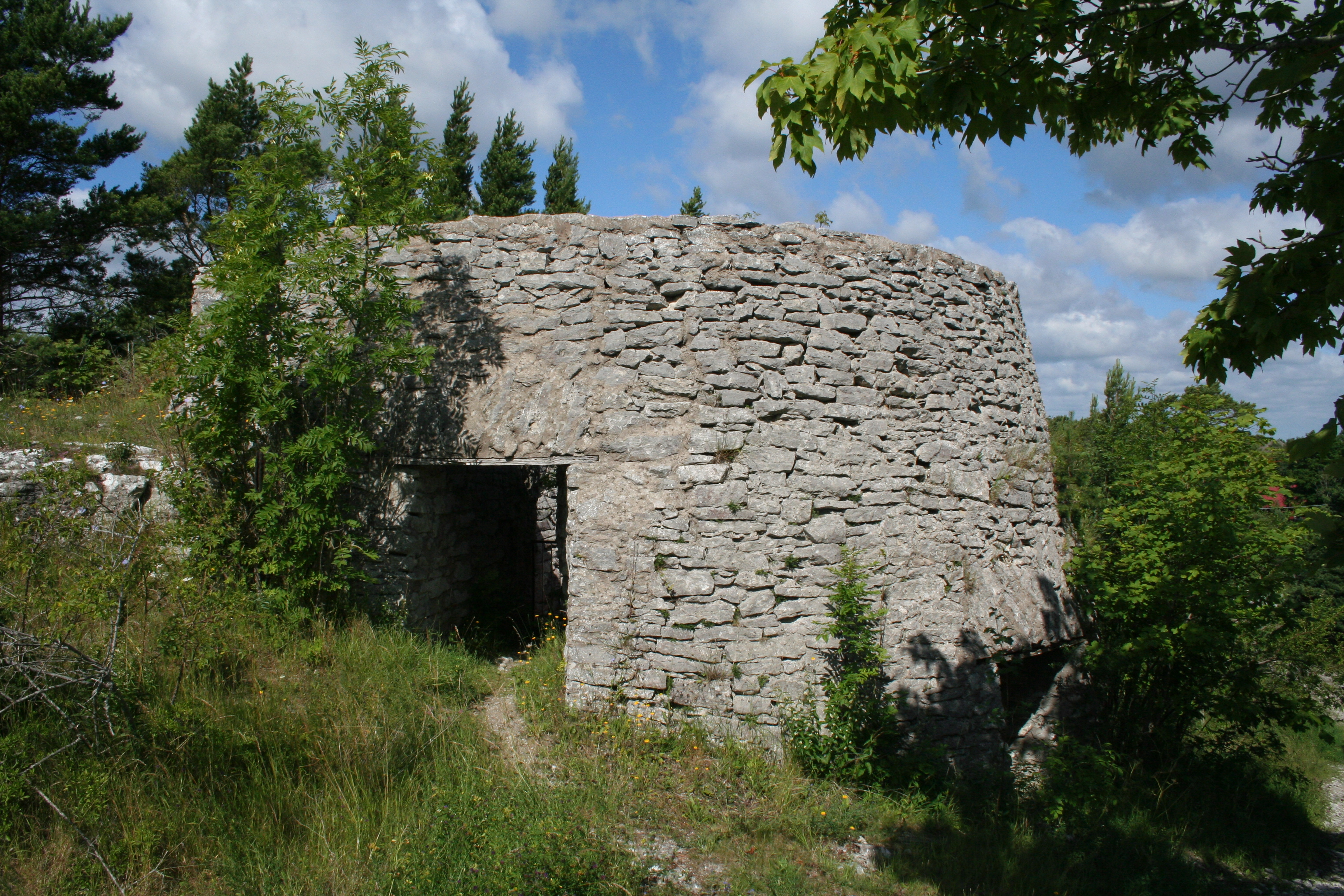 Kalkugnsruin på Östergarnsberget (Östergarn 45:1)